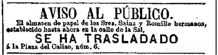 Annuncio relativo al trasferimento del "Almacen de papel" dei fratelli Sainz Romillo da via de la Sal a piazza Callao, 6 Madrid - pubblicato su El Liberal di Madrid il 31.8.1879